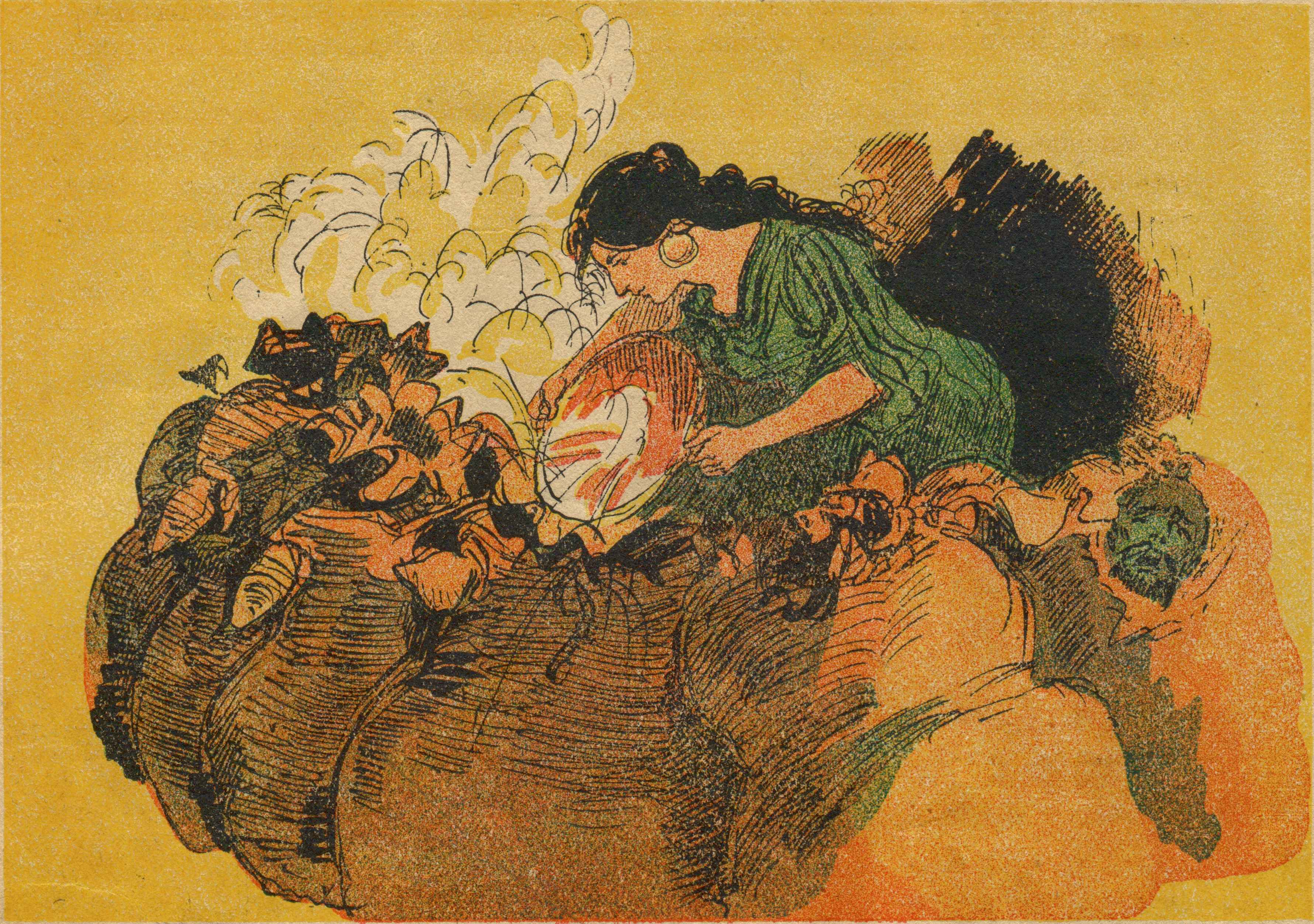 Illustration page 13 d'Ali-Baba et les quarante voleurs par Albert Robida - Paris Imagerie Merveilleuse de l'Enfance